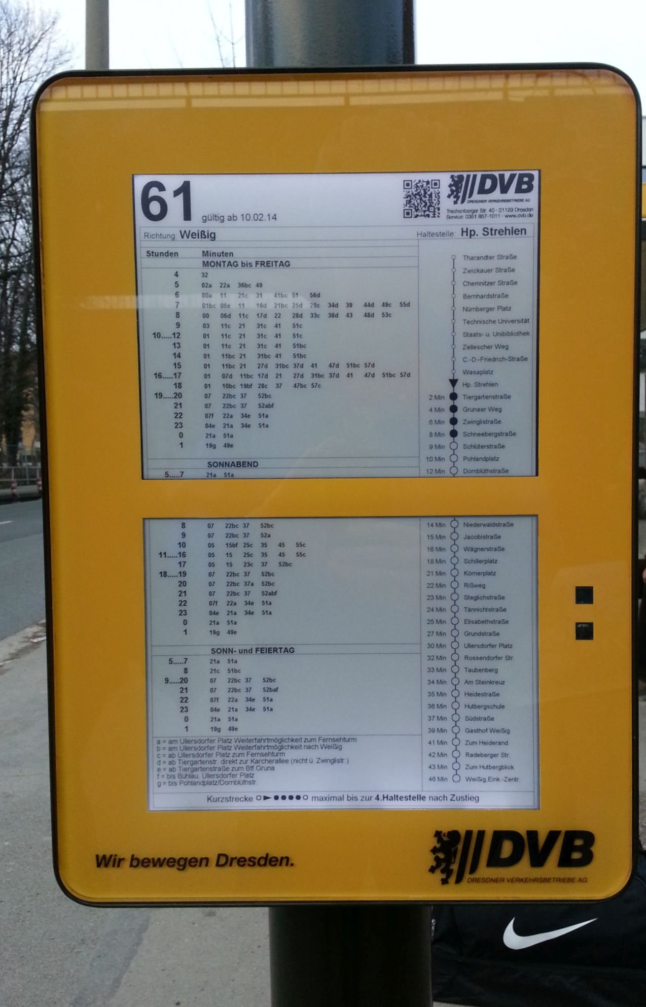 2. Generation des elektronischer Aushangfahrplans der Dresdner Verkehrsbetriebe an der Haltestelle Hp. Strehlen stadteinwärts; südlicher Plan